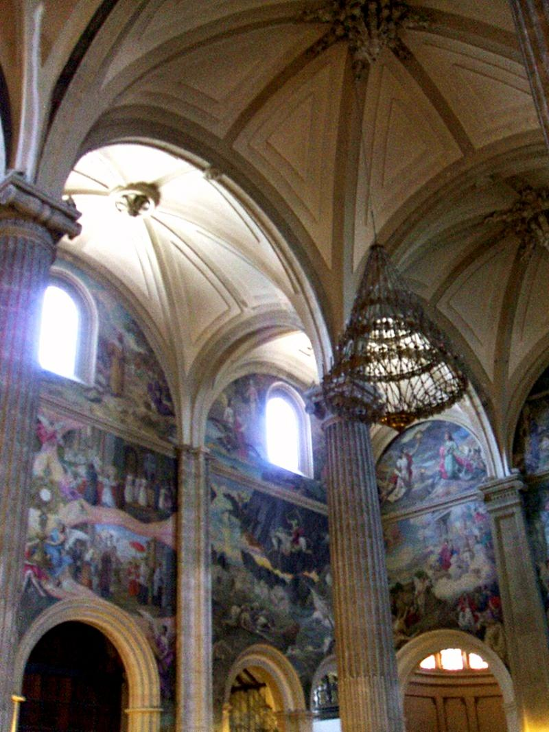 Catedral de San Juan Bautista, Albacete (Castilla-La Mancha, España).